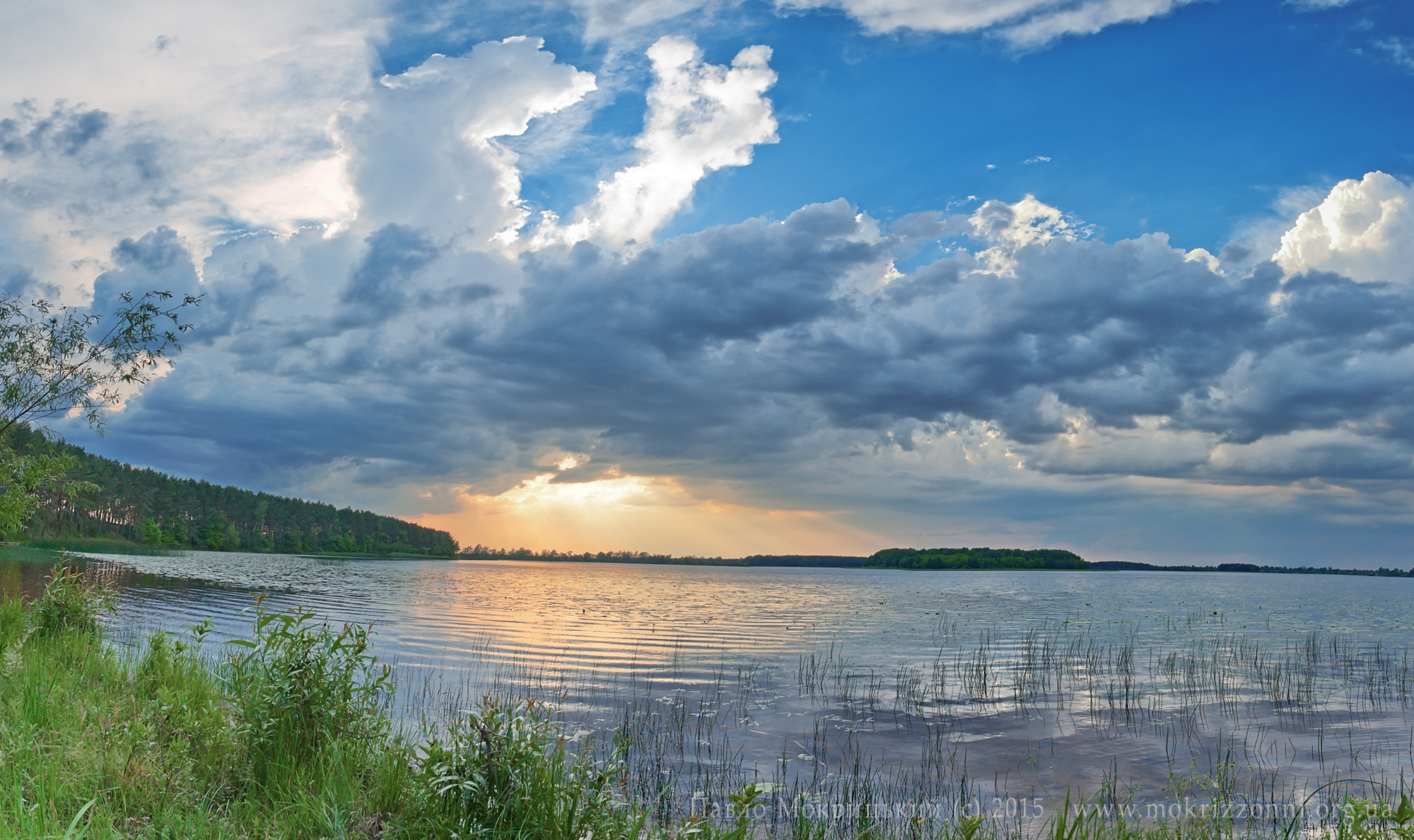 Прип'ять-Стохід, Зарічненський район села Омит, Нобель, Сенчиці, Локриця, Морочне, Неньковичі